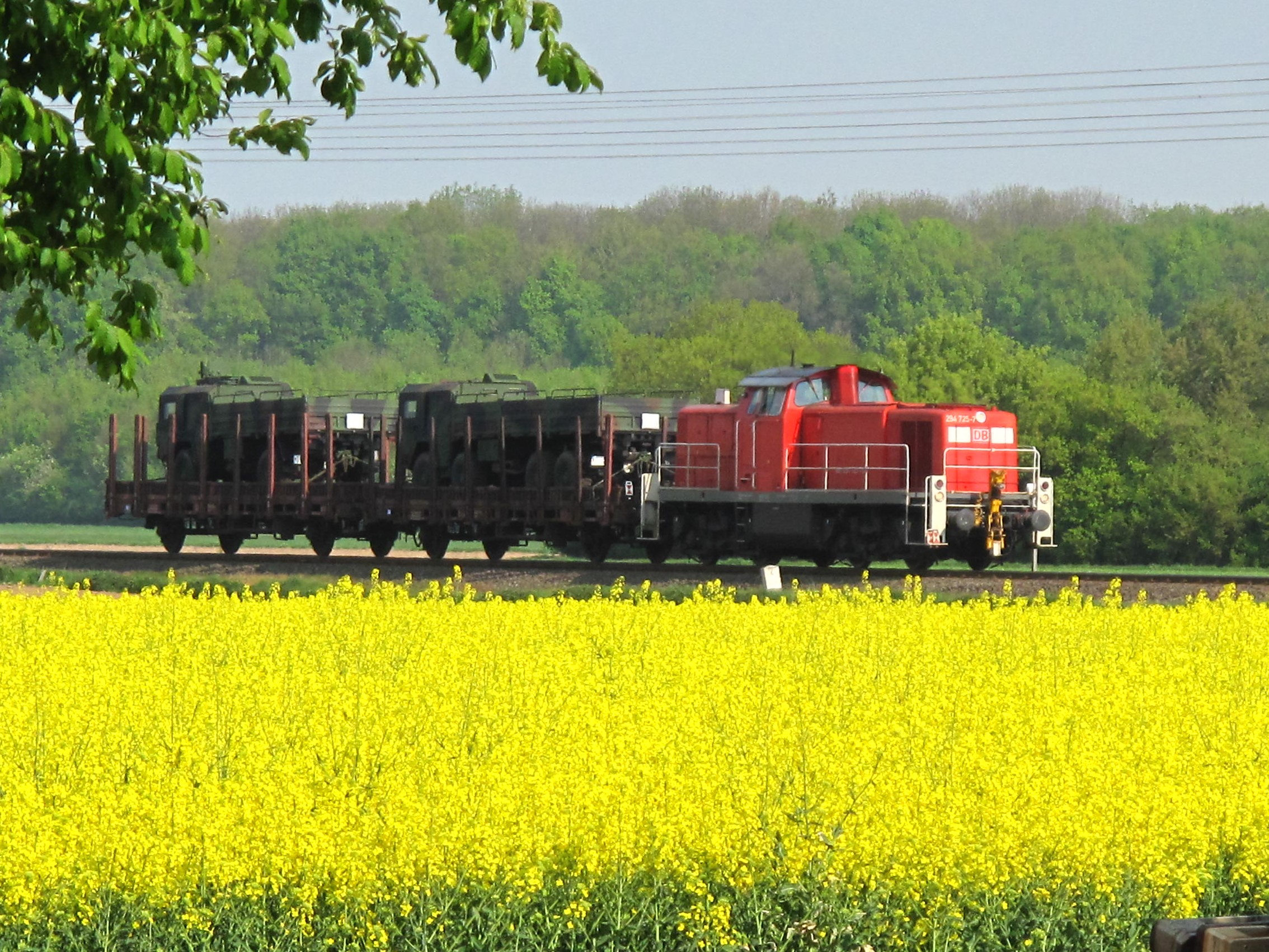 Aufgenommen am 21. April 2011 um 10.30 Uhr kurz vor Selgersdorf